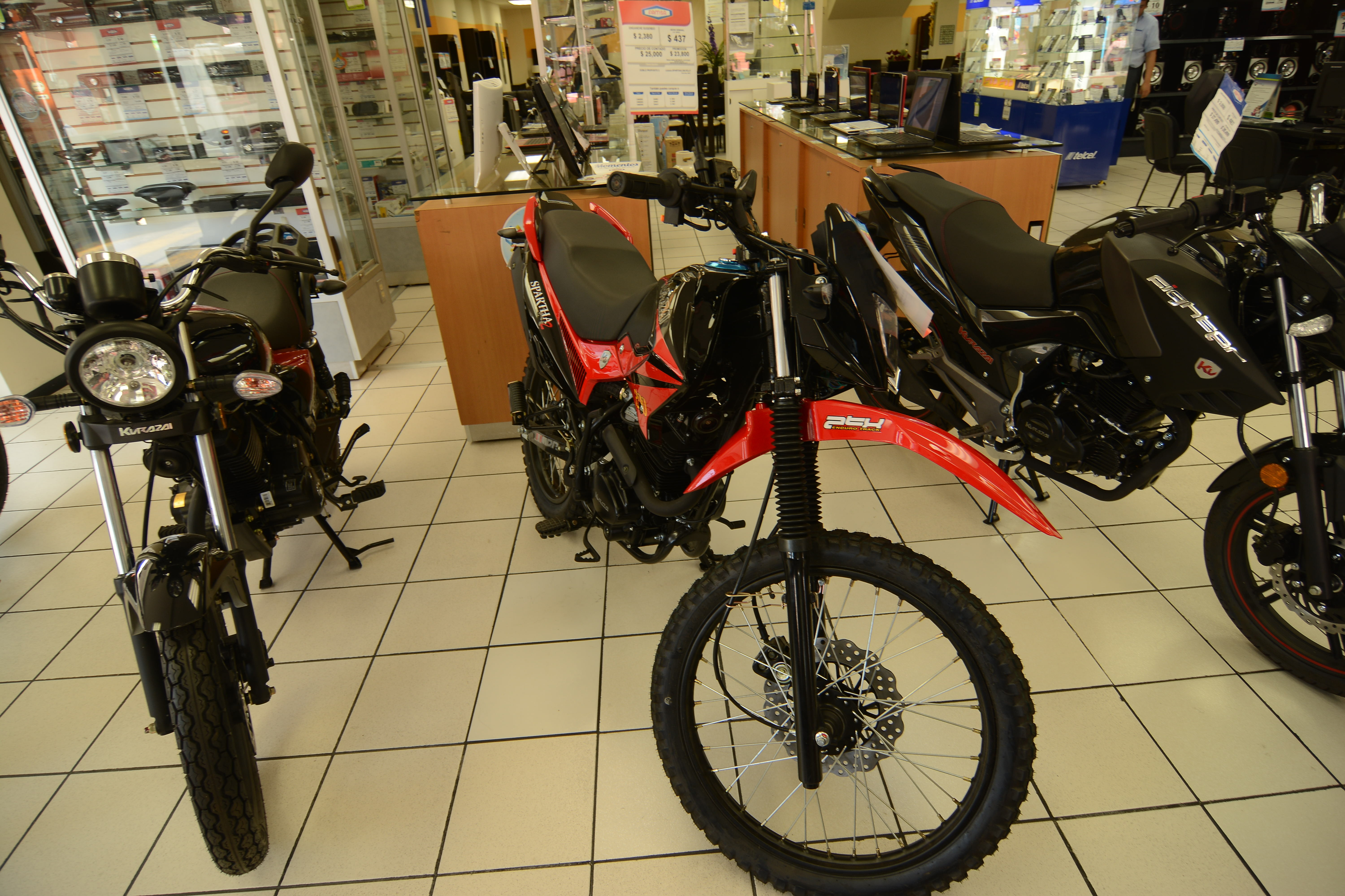 Motocicleta de doble propósito Kurazai Spartha2